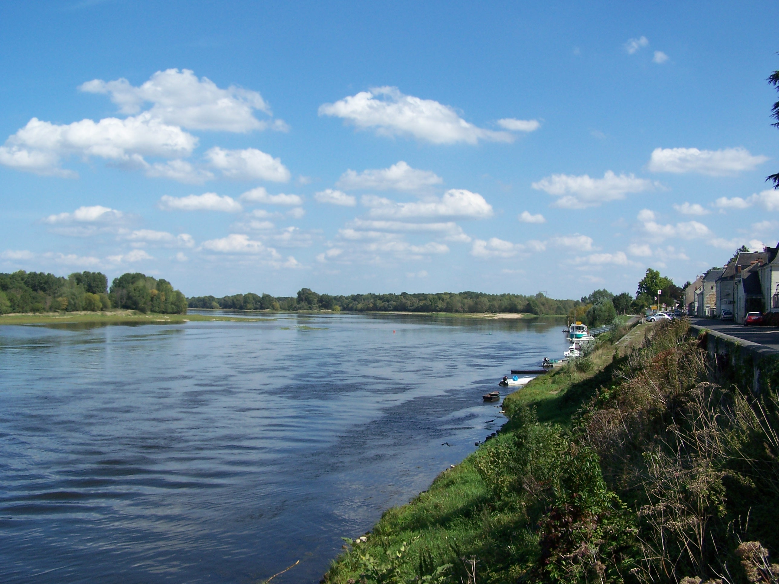 Confluence de la Vienne en bas et de la Loire à Candes-Saint-Martin